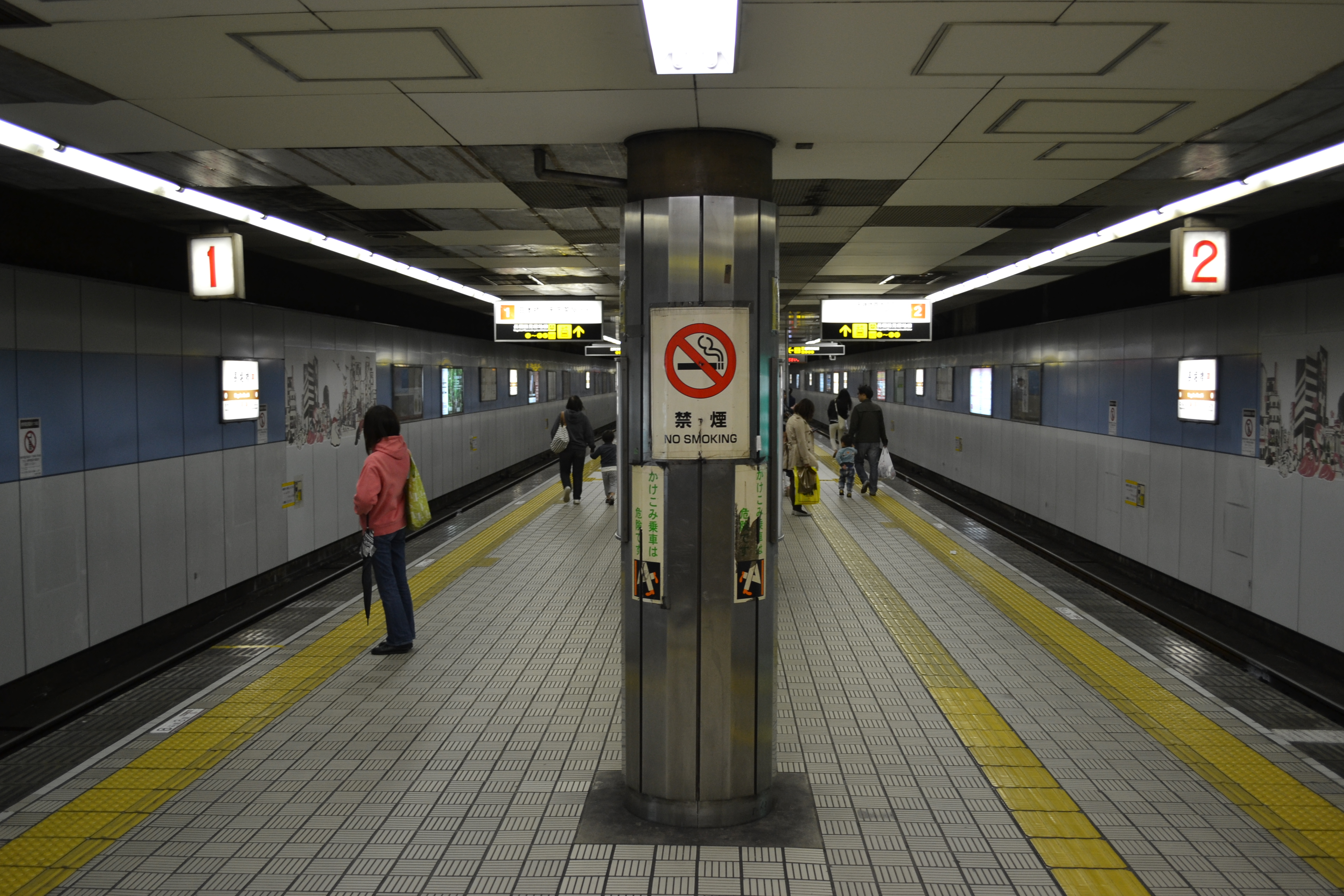 長堀橋駅堺筋線プラットホーム